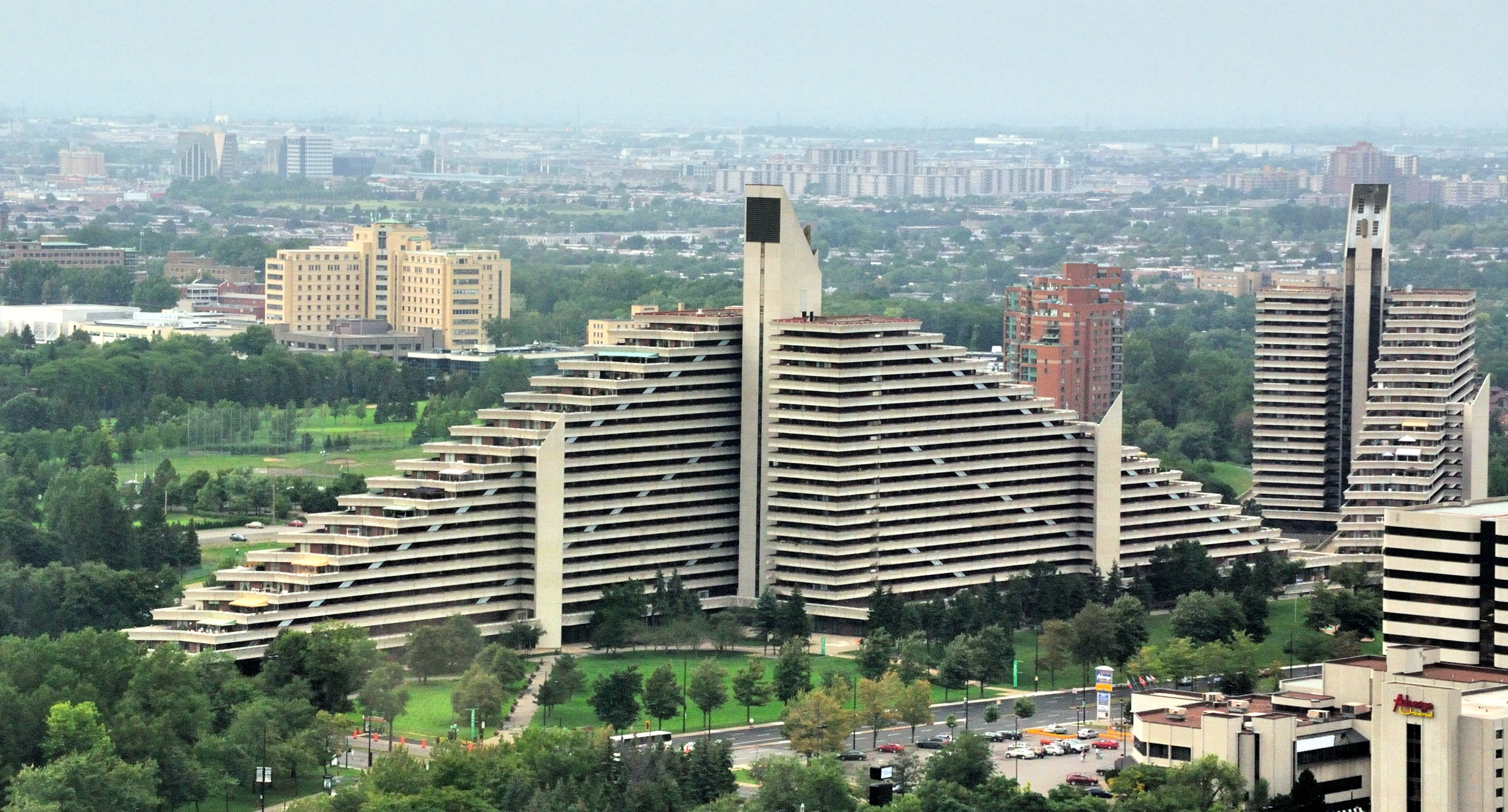 Montreal: Olympisches Dorf vom Olympiaturm aus gesehen